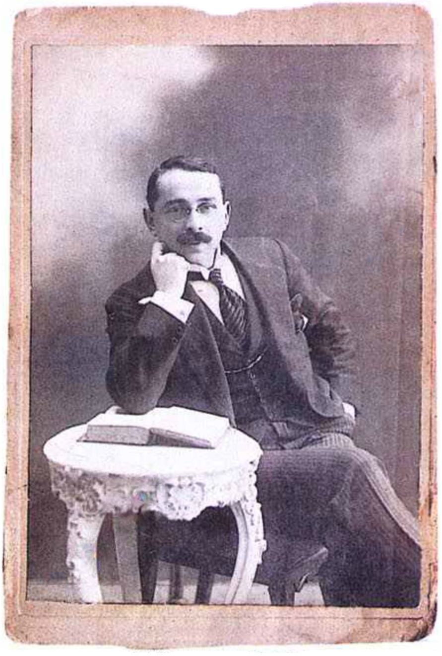 Mustafa Suphi'nin Paris'de Sorbonne'da okuduğu dönemlerden bir fotoğrafı.